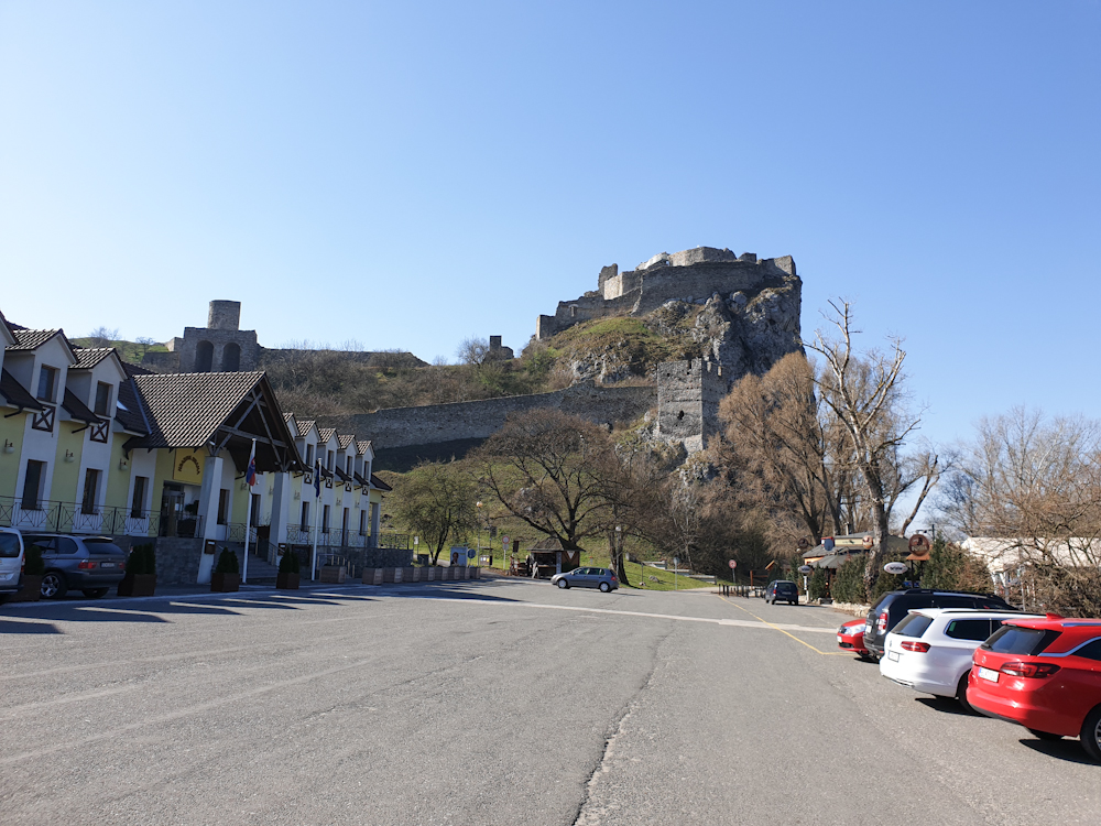 Devín,_castle_2019-03-20label QS:Len,"Devín,_castle_2019-03-20"label QS:Lhu,"Dévény vára, 2019. március 20."